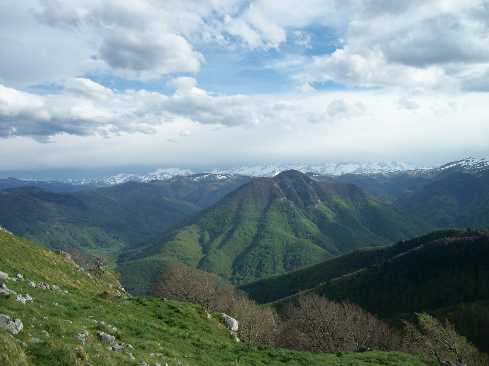 Les Pyrénées